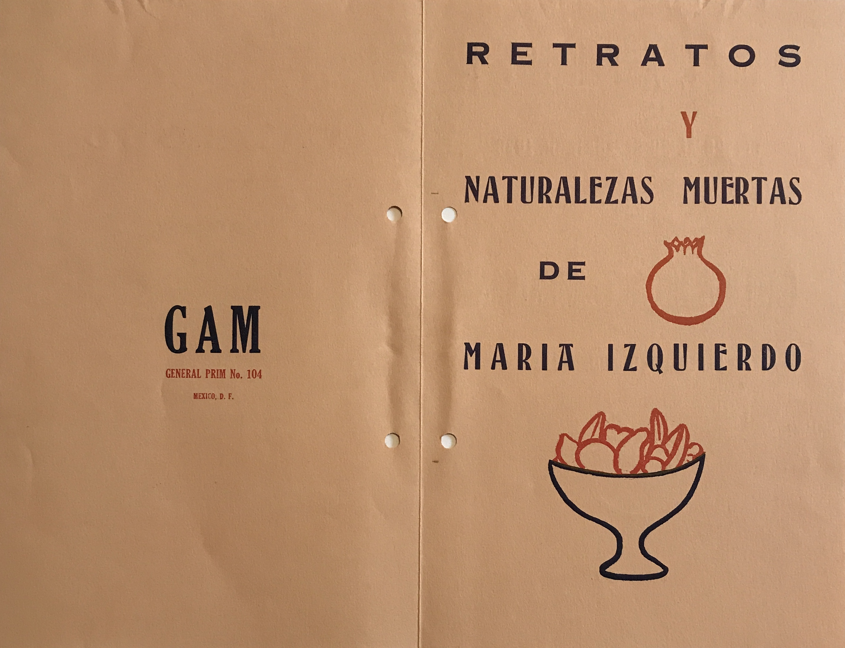 Fotografía de la invitación a la exposición de María Izquierdo de Naturalezas Muertas en la Galería de Arte Mexicano, General Prim 104